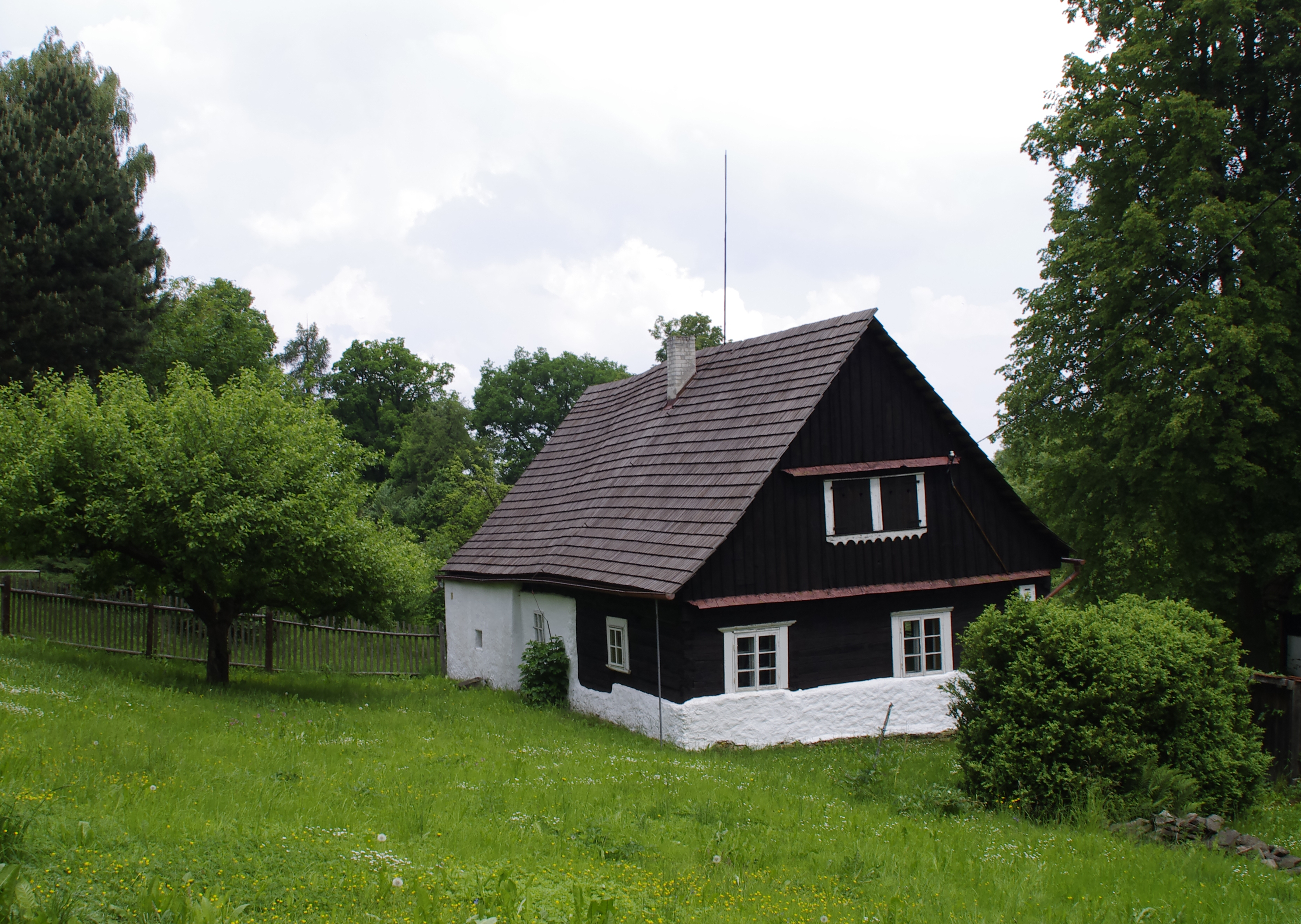 Usedlost čp. 3, Palič 3, Palič. This image was acquired during the event Wikiměsto Mariánské Lázně.